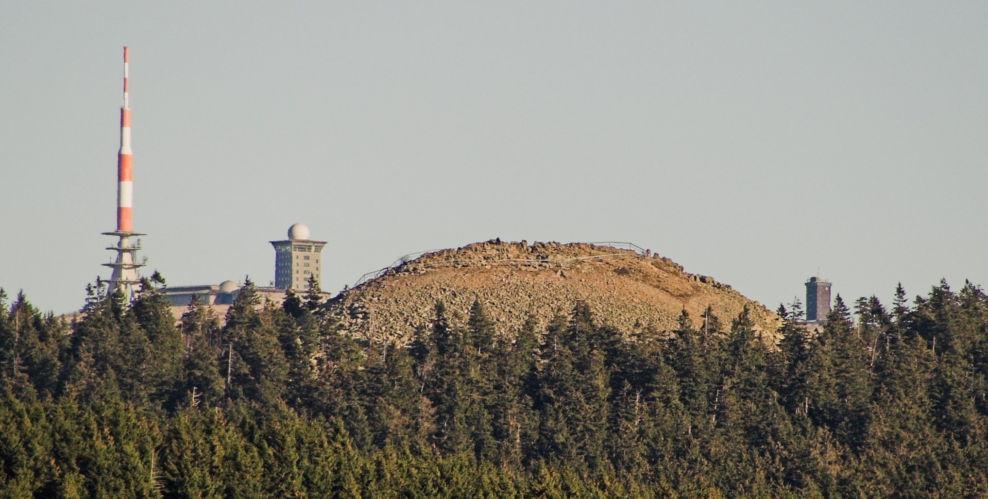 Die Achtermann-Kuppe von der Schneise an der Rehberg-Ostseitea aus photographiert.